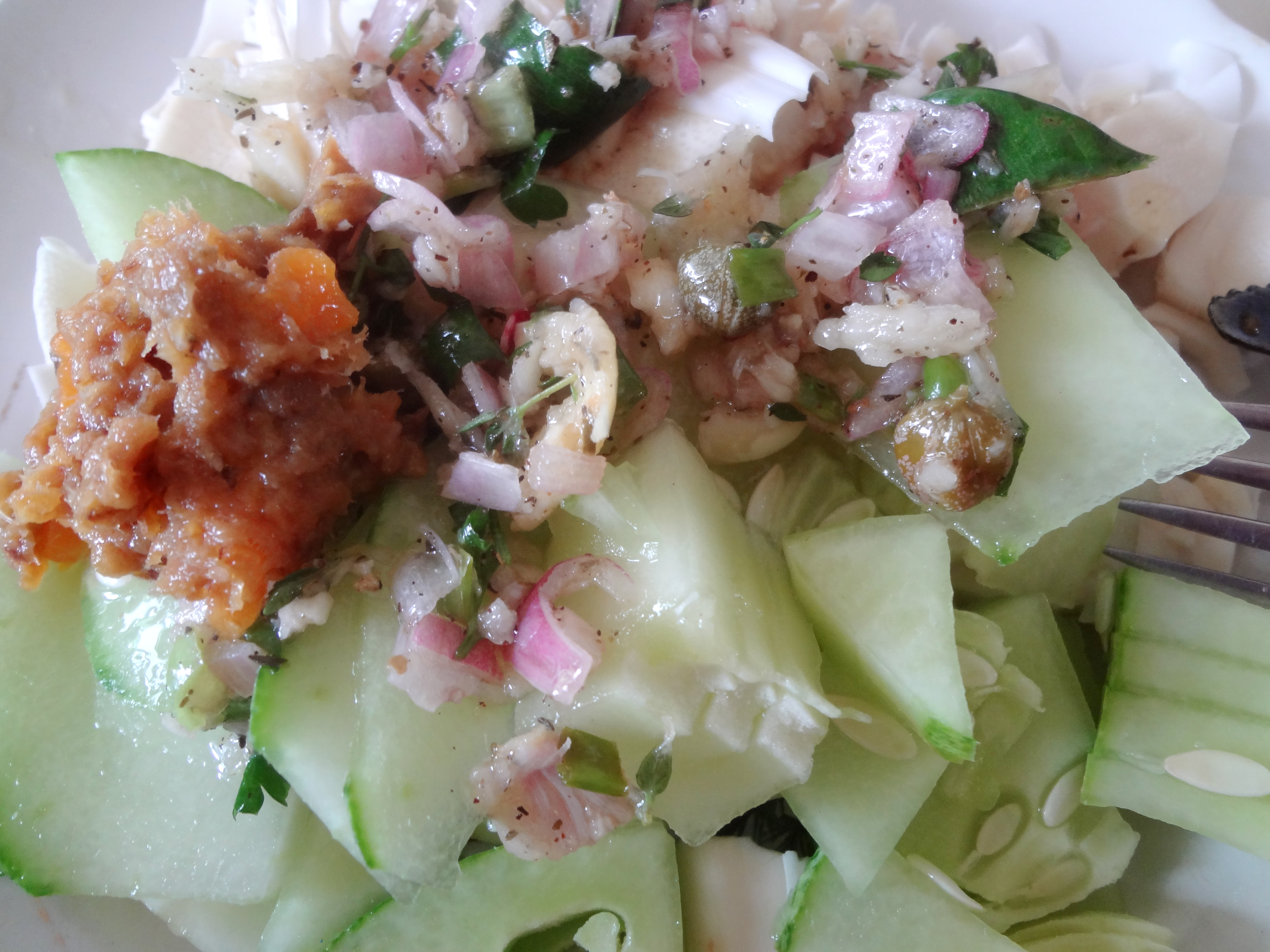 Sauce chien maison sur une salade, Martinique, août 2015.